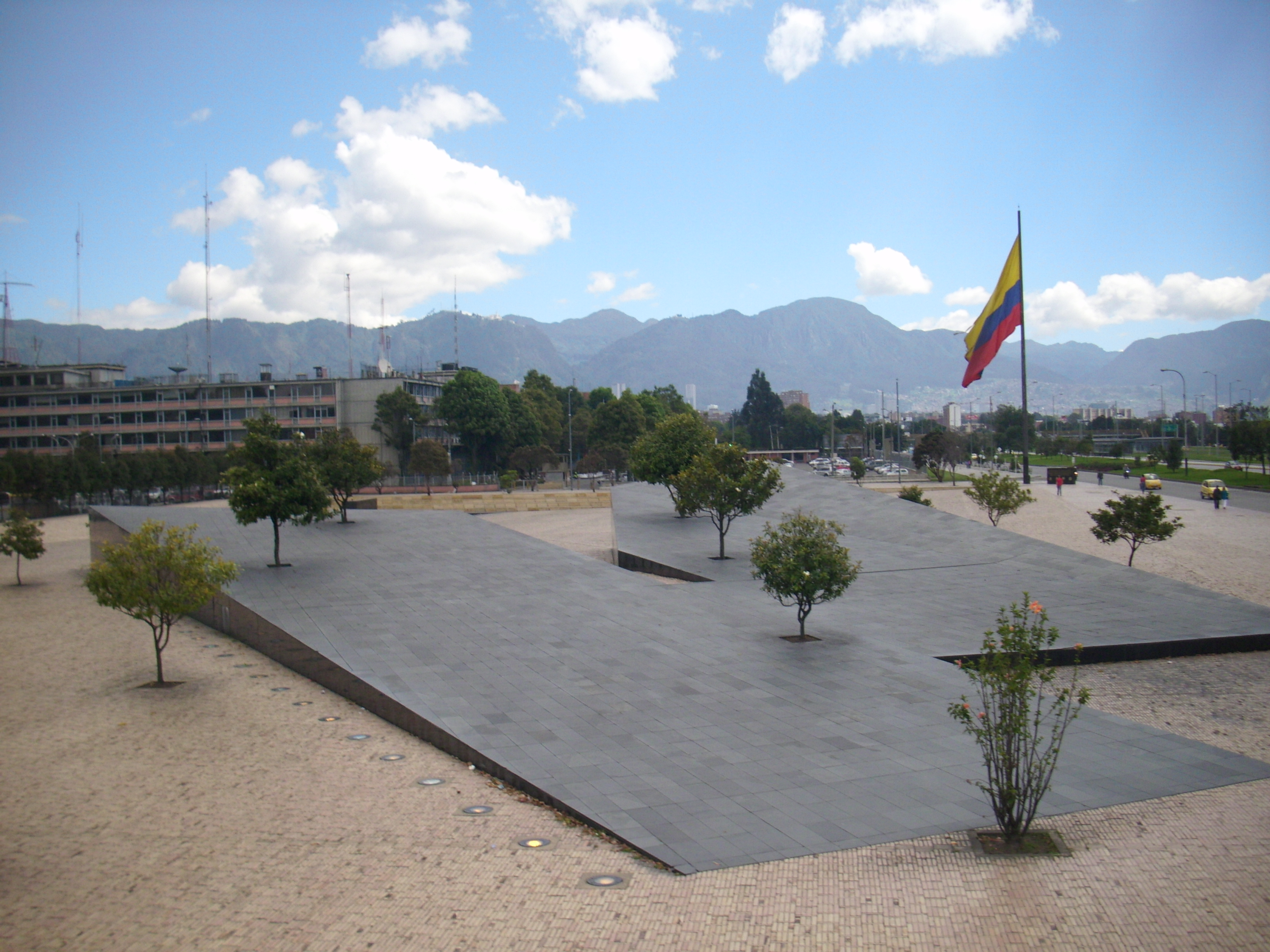 Momunento a los Caídos en Combate (CAN, Bogotá, Colombia)